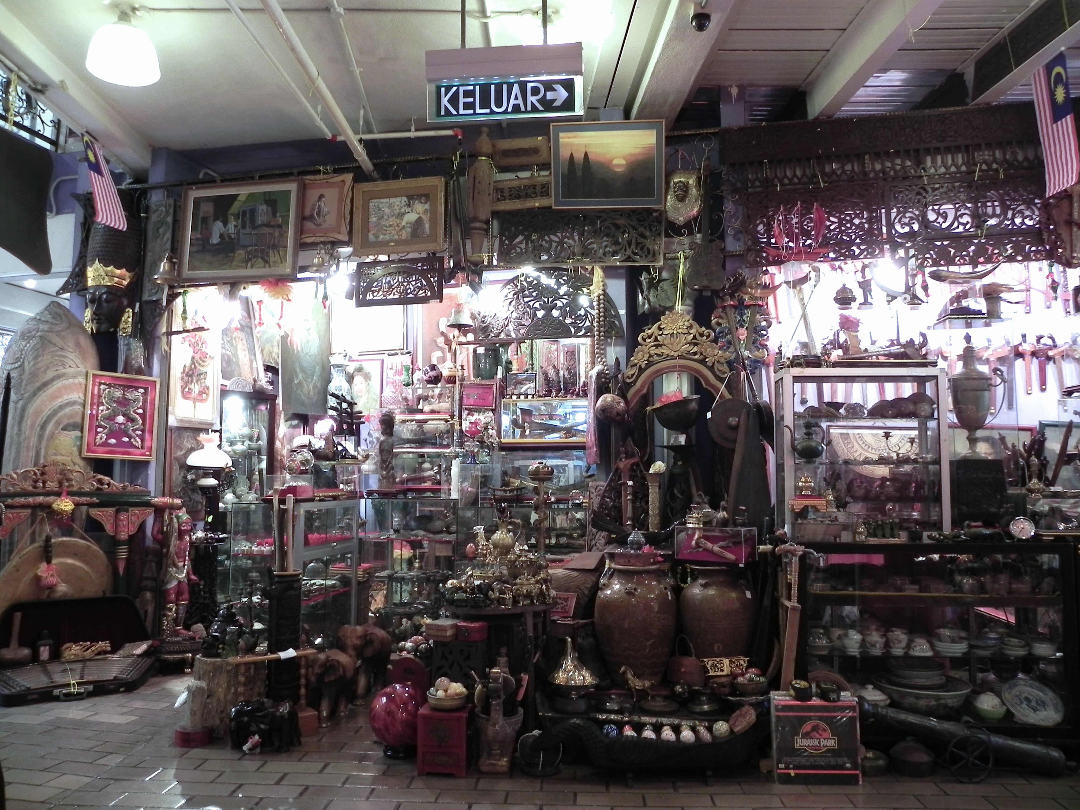 Souvenirs im Central Market, Kuala Lumpur